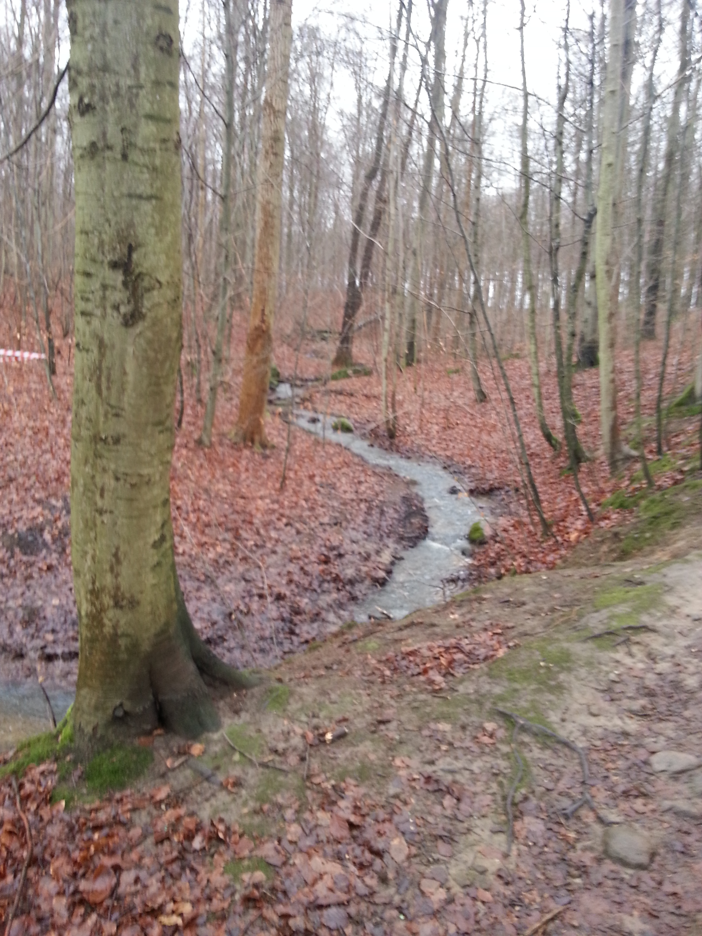 Egebækken i Egebæksvang